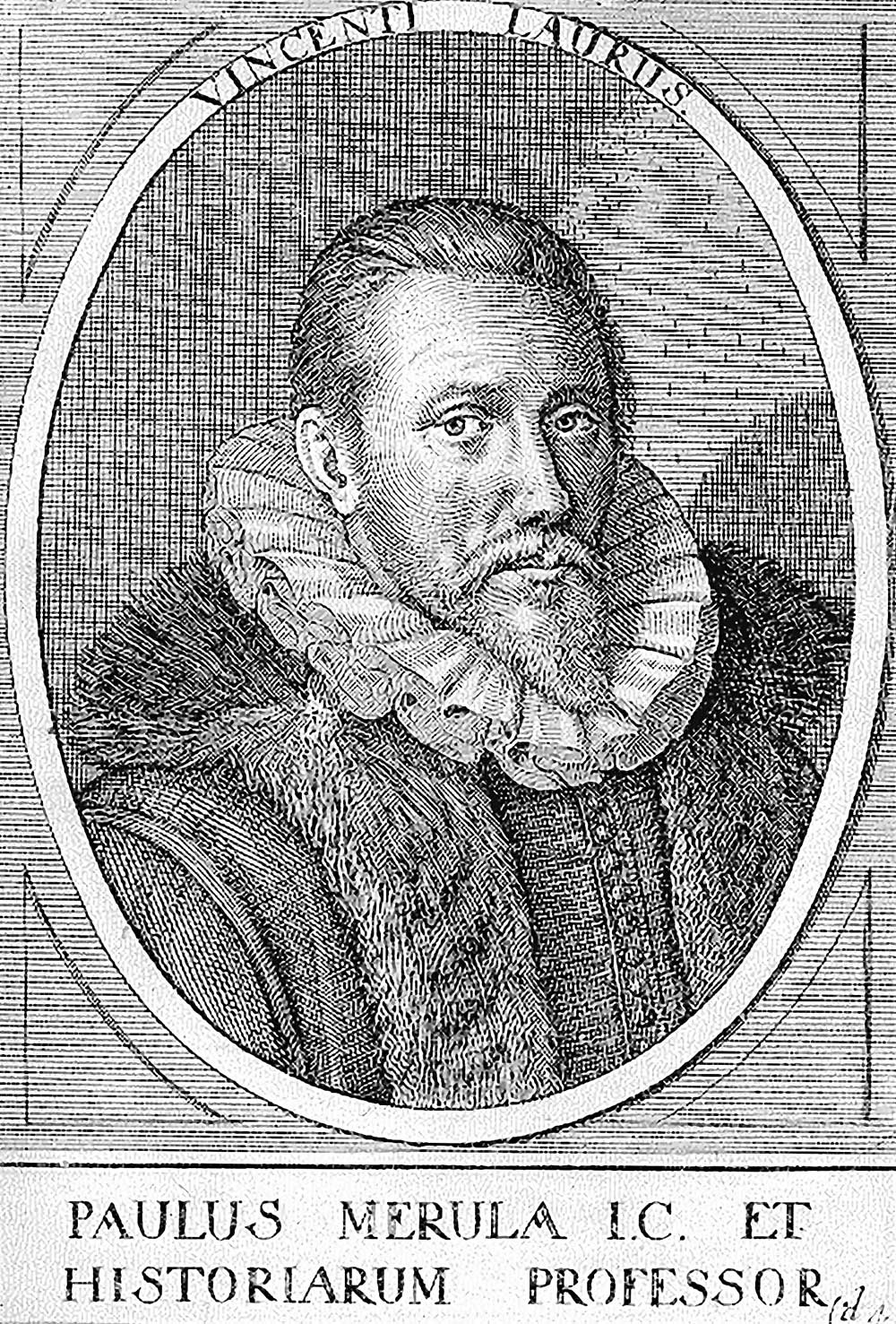 Paul Merula (1558-1607) war ein niederländischer Jurist, Historiker, Geograph und Bibliothekar